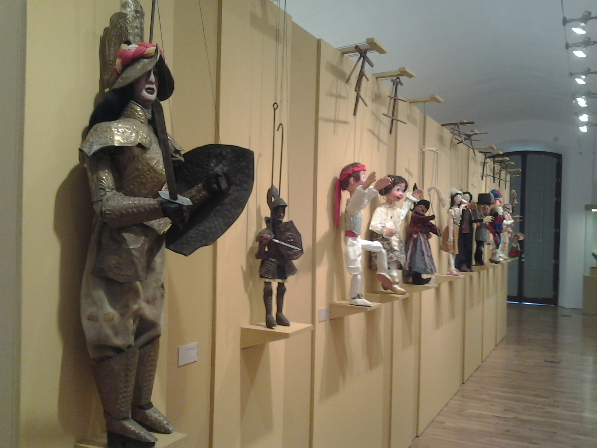 Sala del Museo Iberoamericano del Títere de Cádiz.